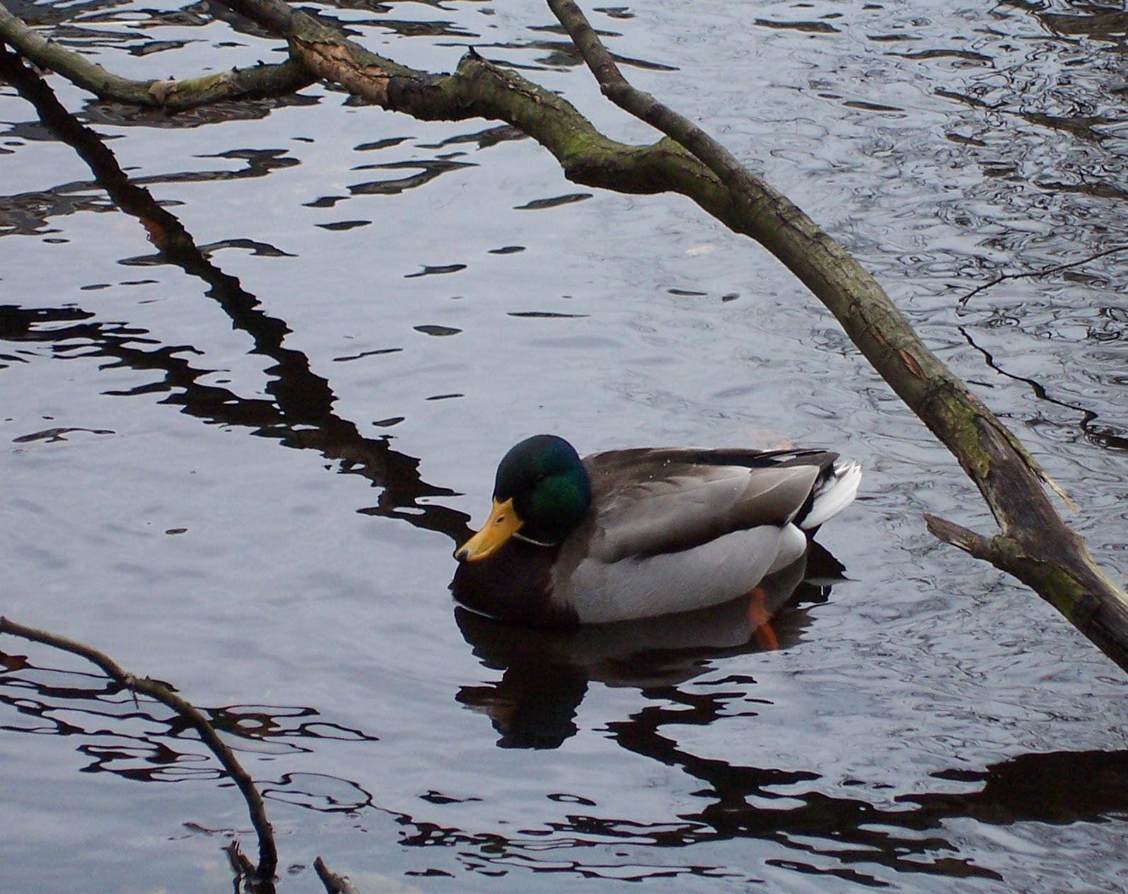 A mallard drake